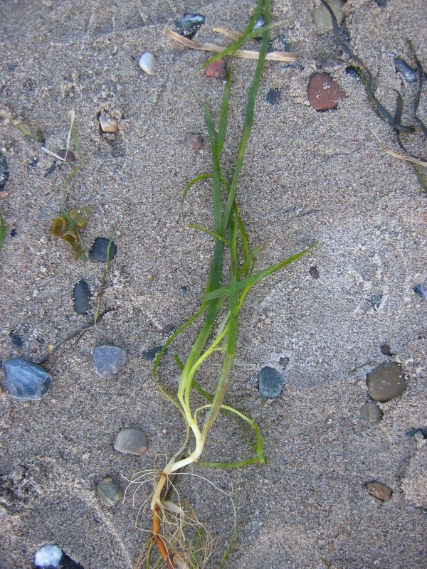 Gewöhnliches Seegras Zostera marina, Stoltera Nähe Rostock